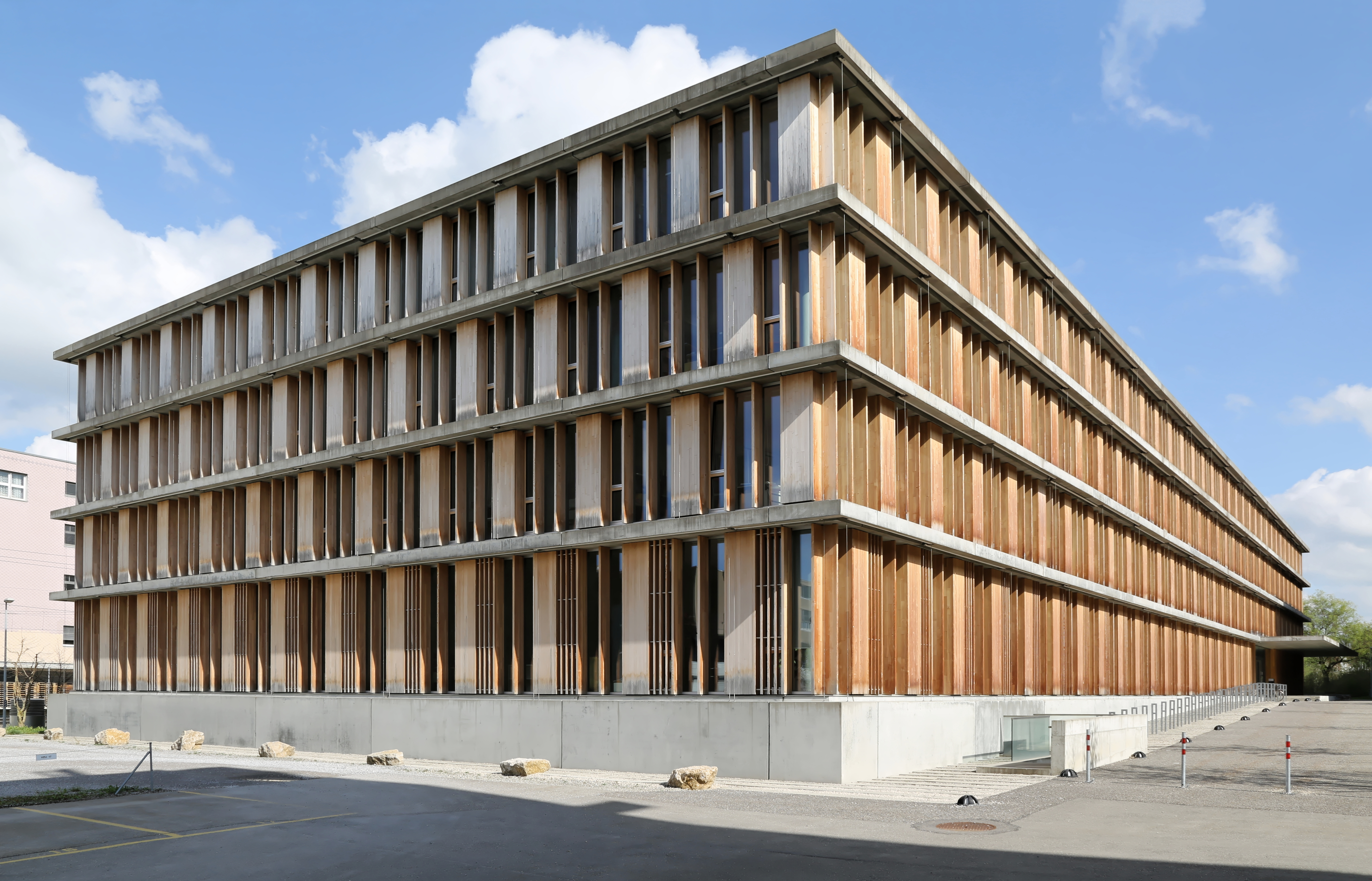 Bundesamt für Verkehr BAV in Ittigen, Ansicht aus westlicher Richtung